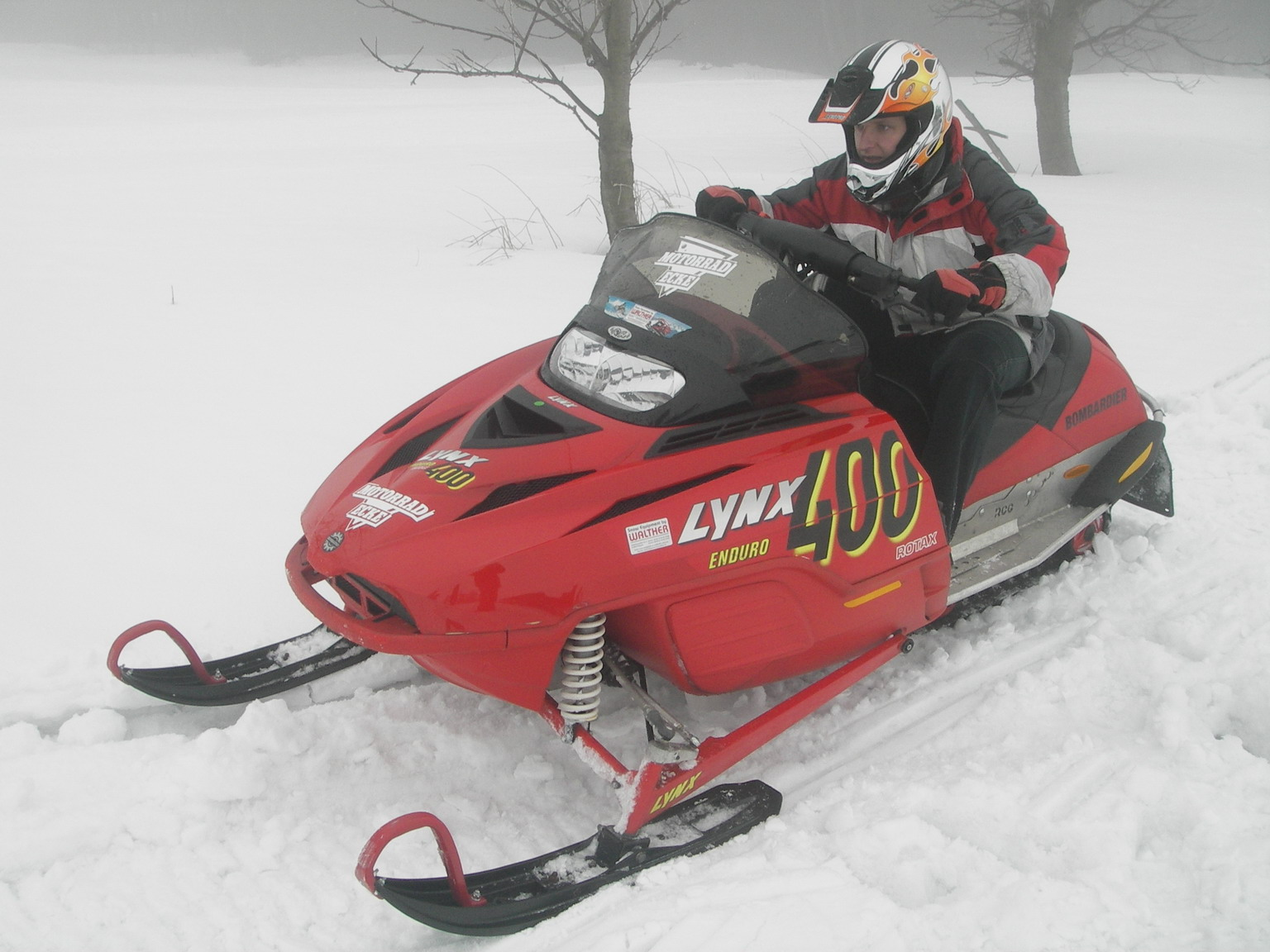 Lynx 400